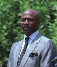 C41841-9, President Reagan speaking at a Take Pride in America event with actors Clint Eastwood and Louis Gossett Jr. in the Rose Garden. 7/21/87